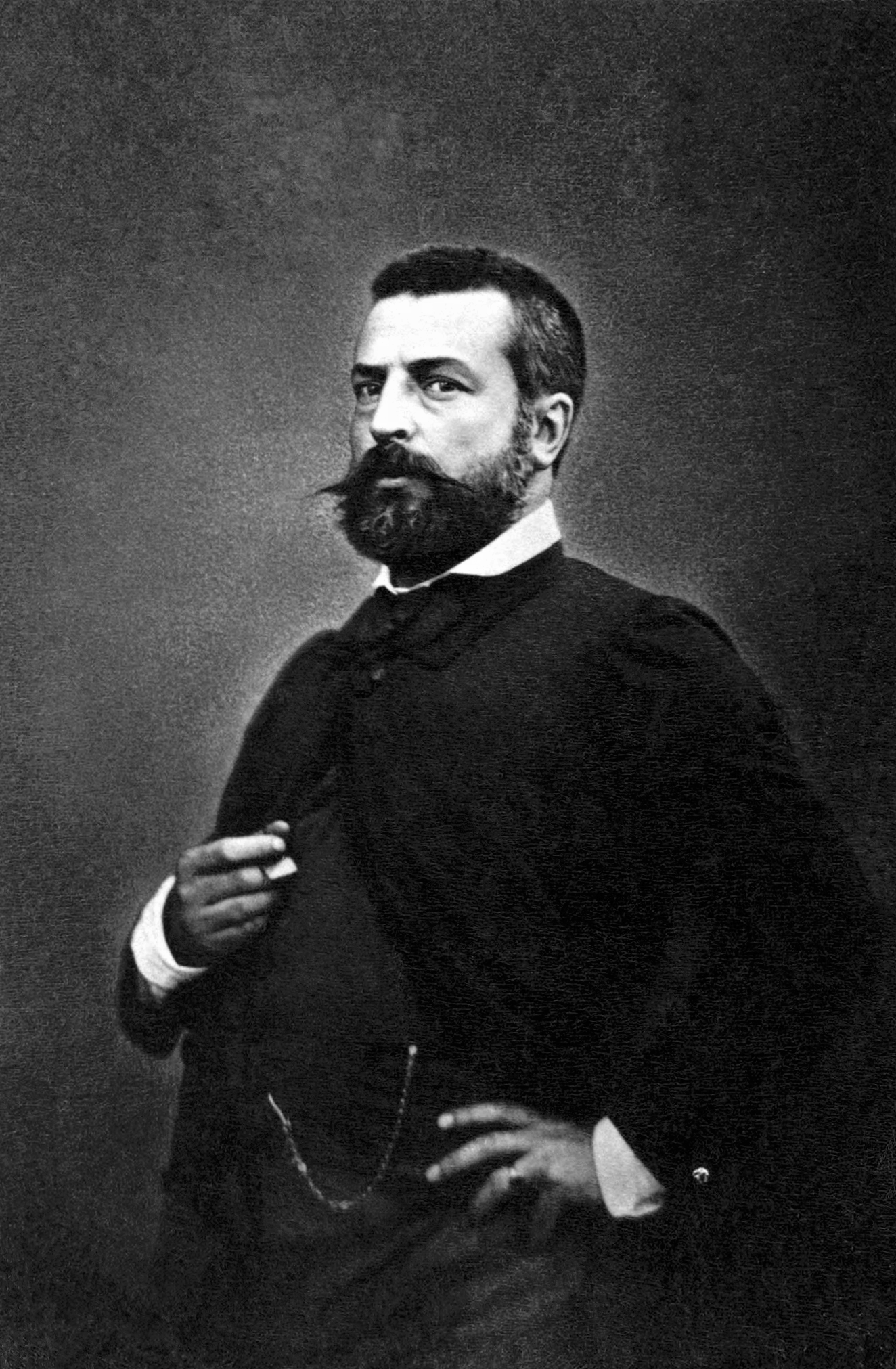 Ernest Meissonier (1815–1891), French painter.